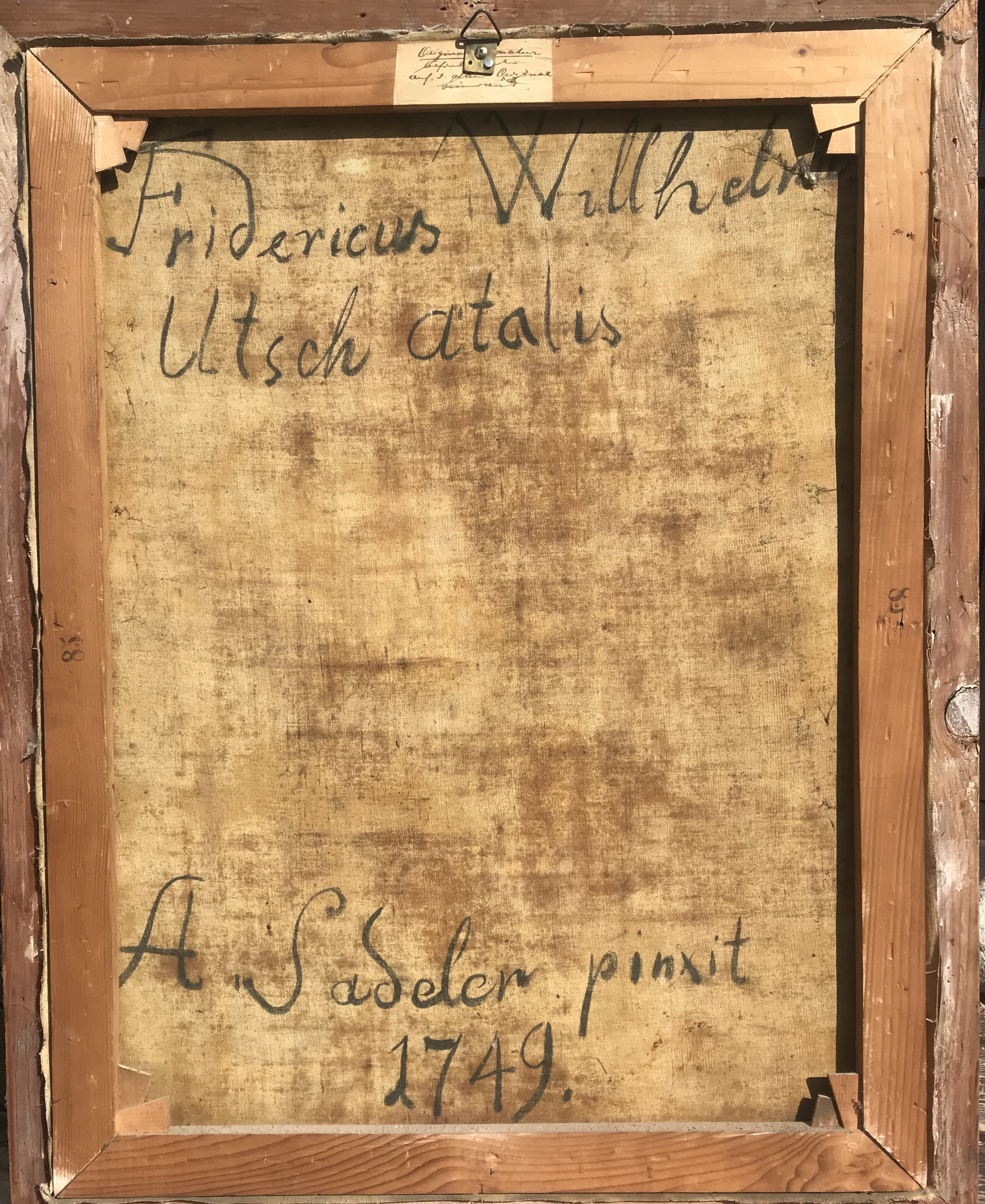 Rückseite mit Signatur des Malers